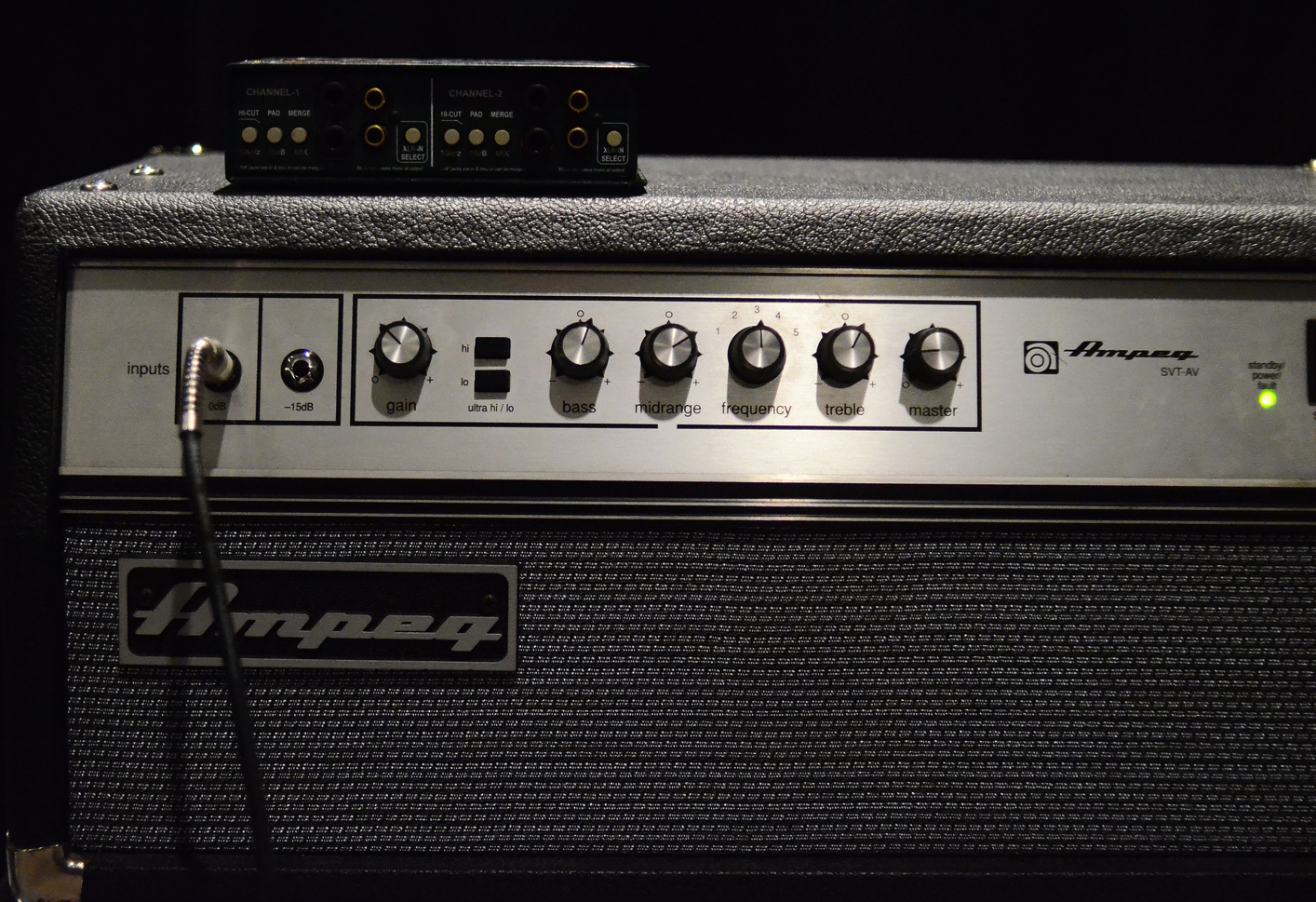 Norman W-R svt settings